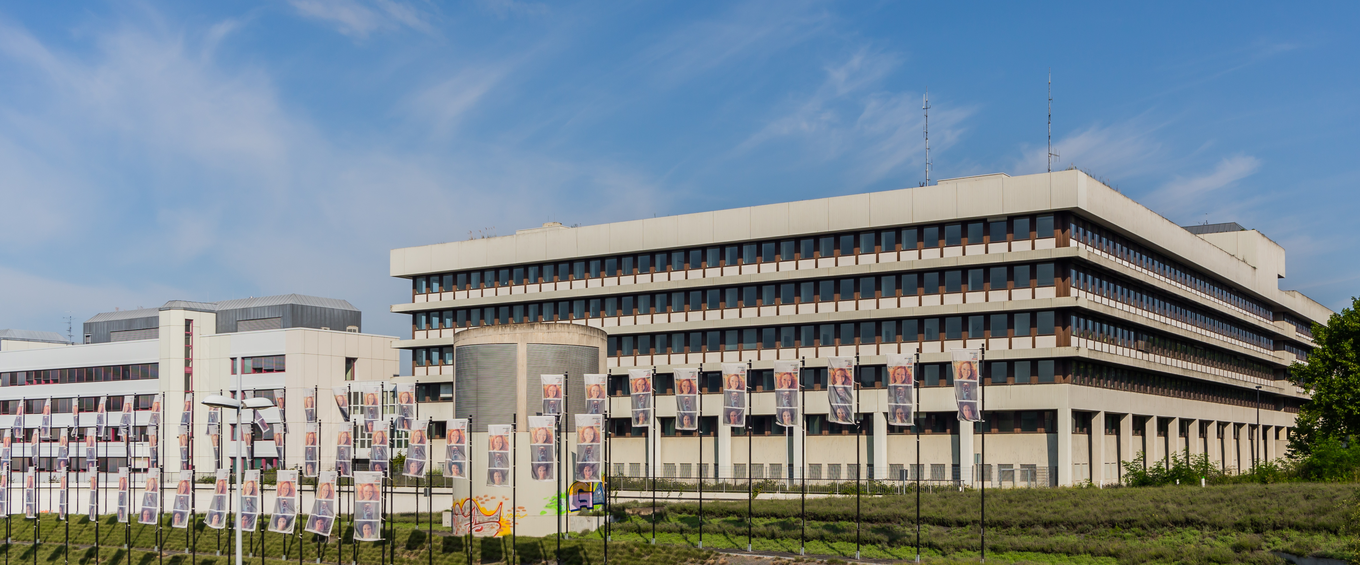 Landesbehördenhaus, Friedrich-Ebert-Allee 44, Bonn-Gronau